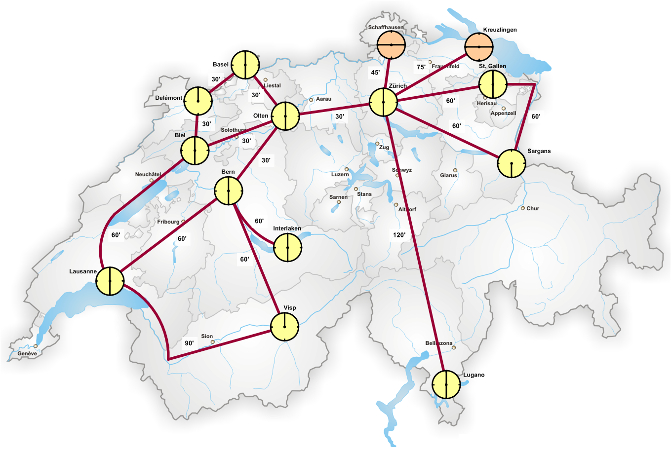 Knotensystem der Schweiz mit Bahn 2000 2. Etappe /ZEB (2030, Stand 2007)